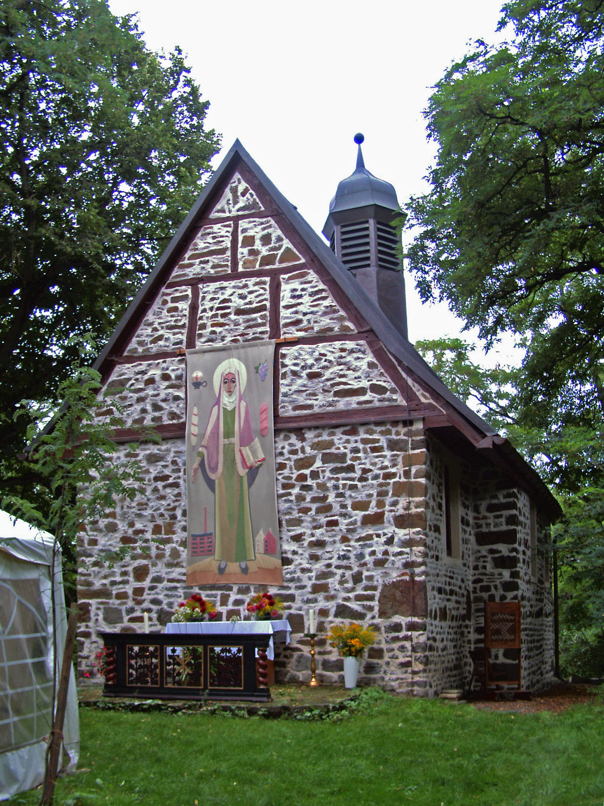 Katholische Kapelle St. Anna auf Gut Glüsig bei Ackendorf